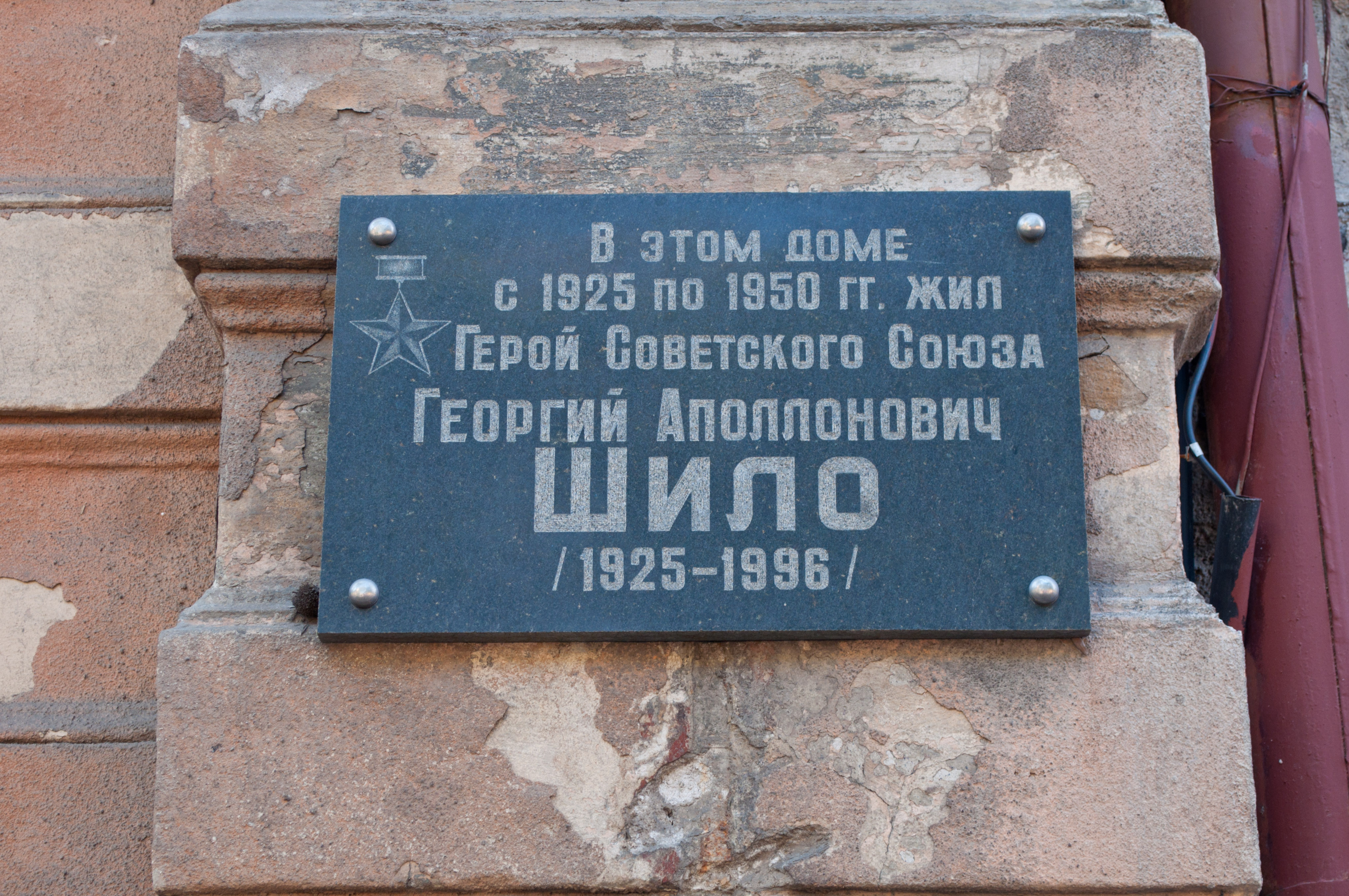 Будинок, у якому жив П.І. Молчанов - український композитор та муз. педагог, професор